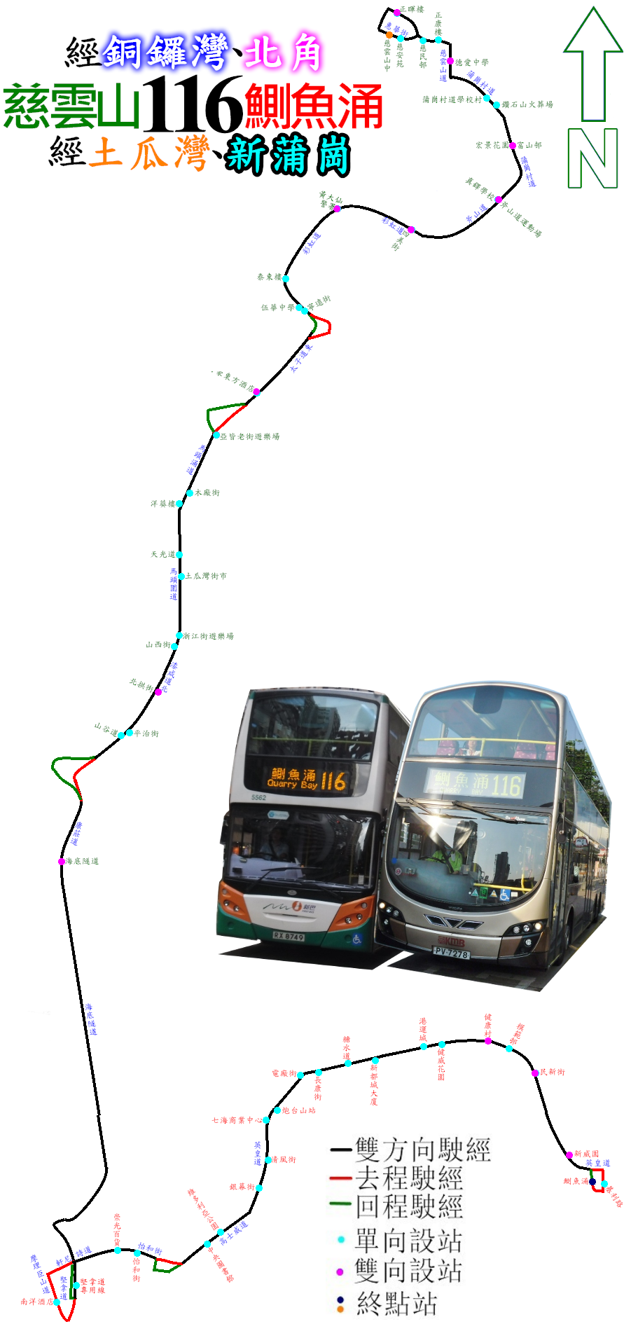 中文（香港）: 過海隧巴116路的走線圖